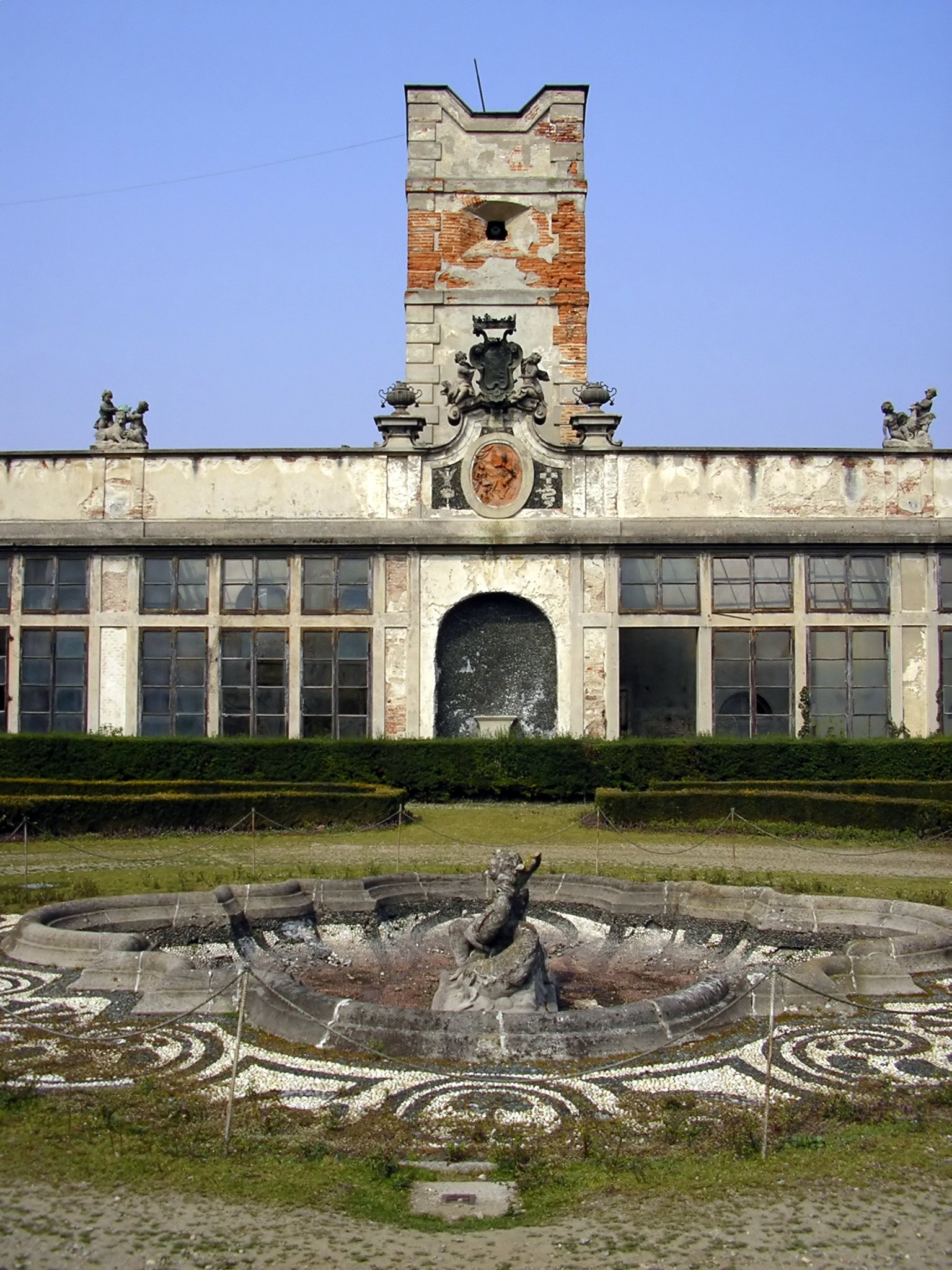 Torre dell'acqua e serra della Villa Arconati di Castellazzo di Bollate (MI).